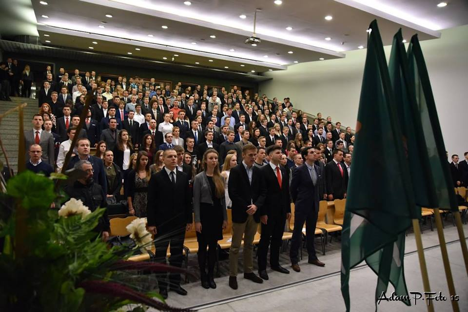 Zjazd wyborczy Młodzieży Wszechpolskiej w Częstochowie w 2015 roku.